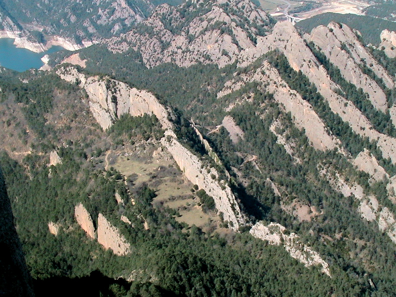 Visió de conjunt de la zona dels Llengots